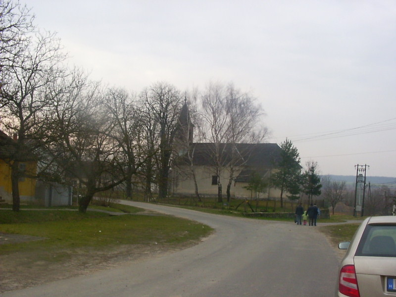 Nagydémi római katolikus templom